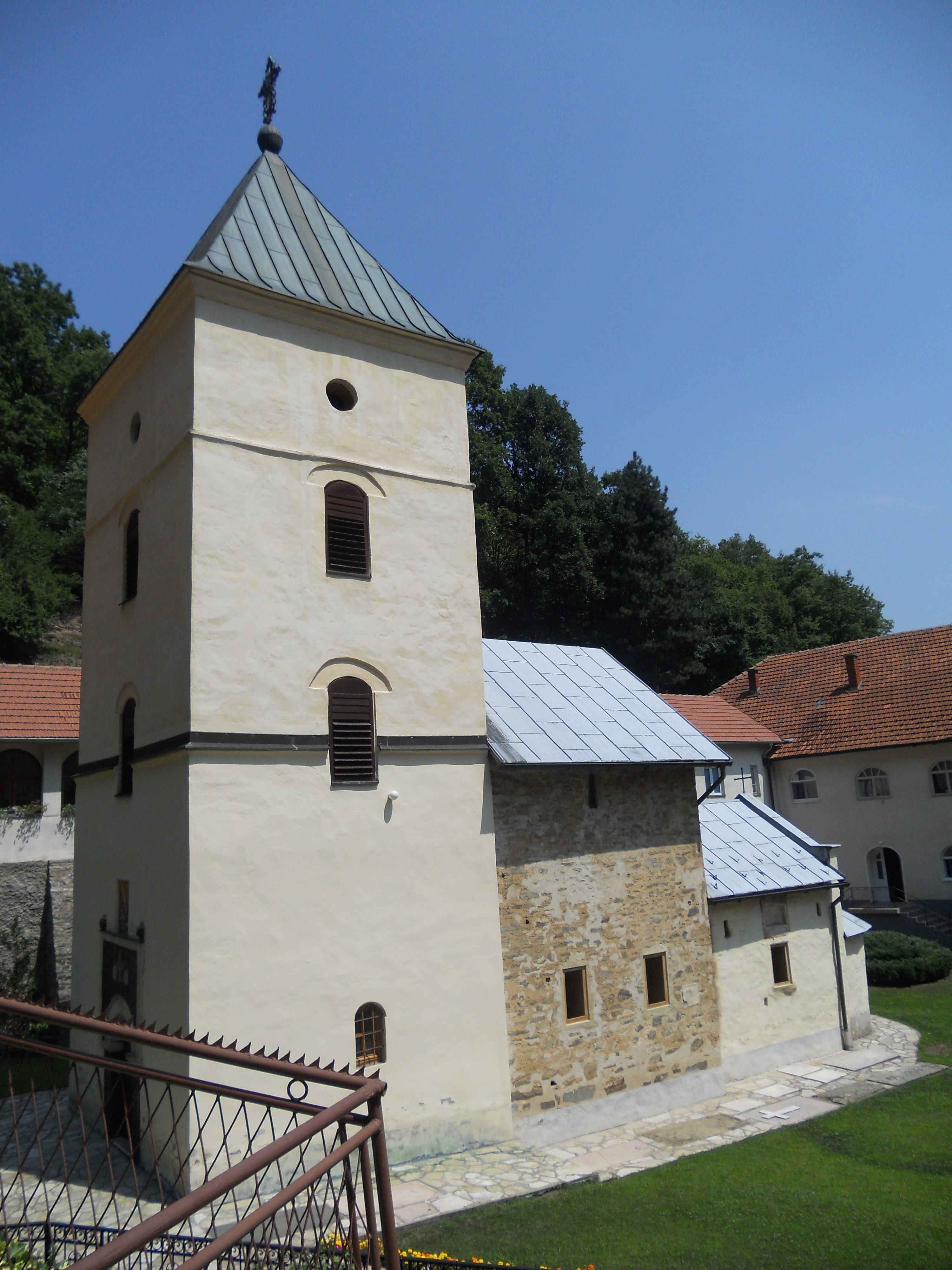 Manastir Blagoveštenje Rudničko